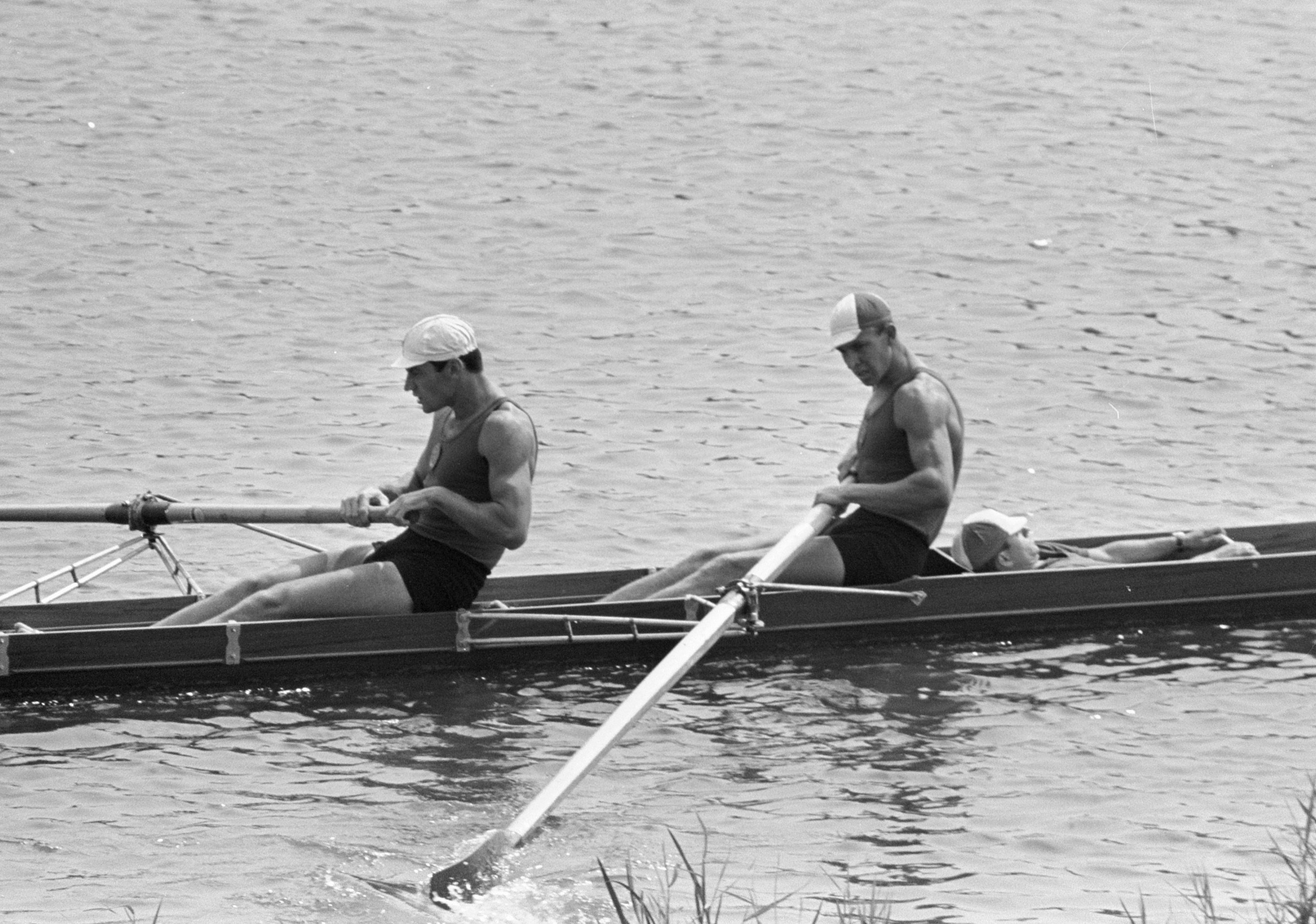 Europese roeikampioenschappen op de Bosbaan, twee met nr. 14 USSR, 15 Denemarken, 16 Griekenland, nr. 17 Italie